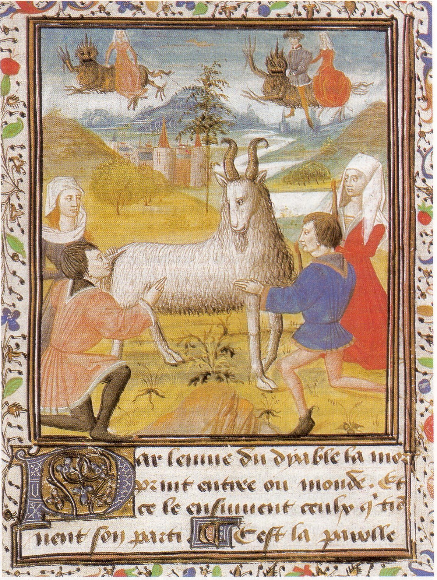 Hexen/Waldenser verehren einen Zigenbock (Hexensabbat), Miniatur aus: Du Crisme de Vauderye, 1460